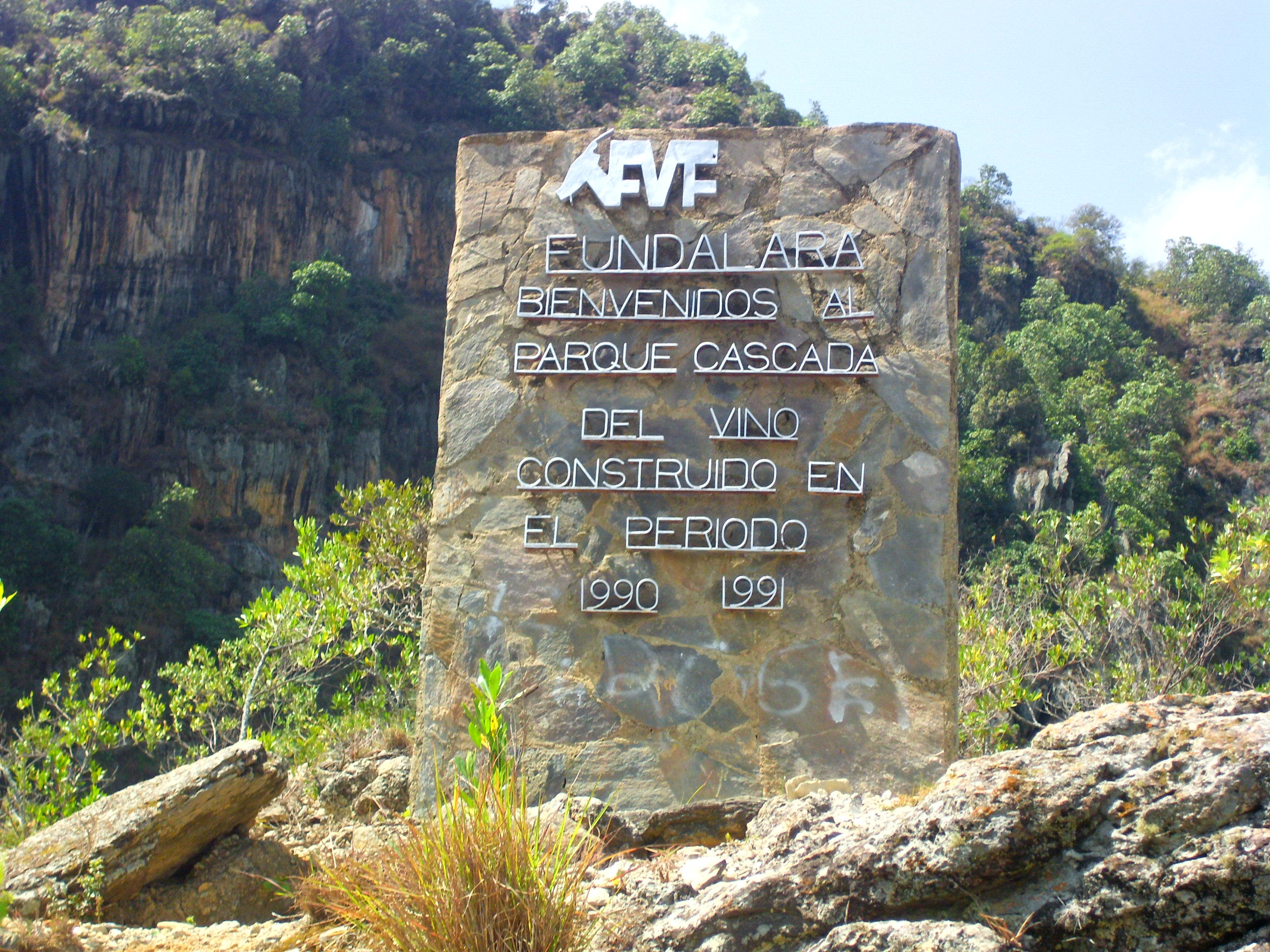 Barbacoas, Edo. Lara